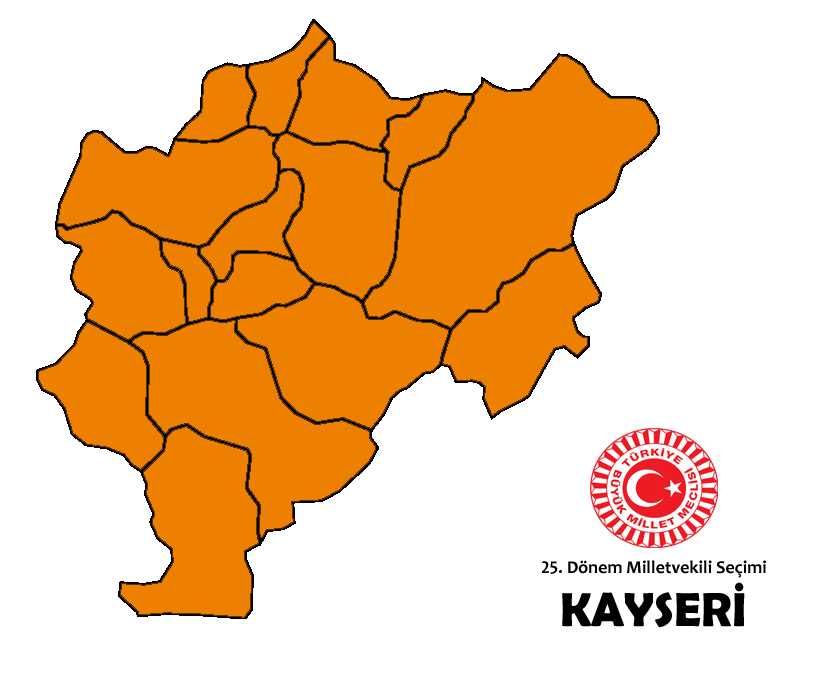 2015 genel seçim sonuçları